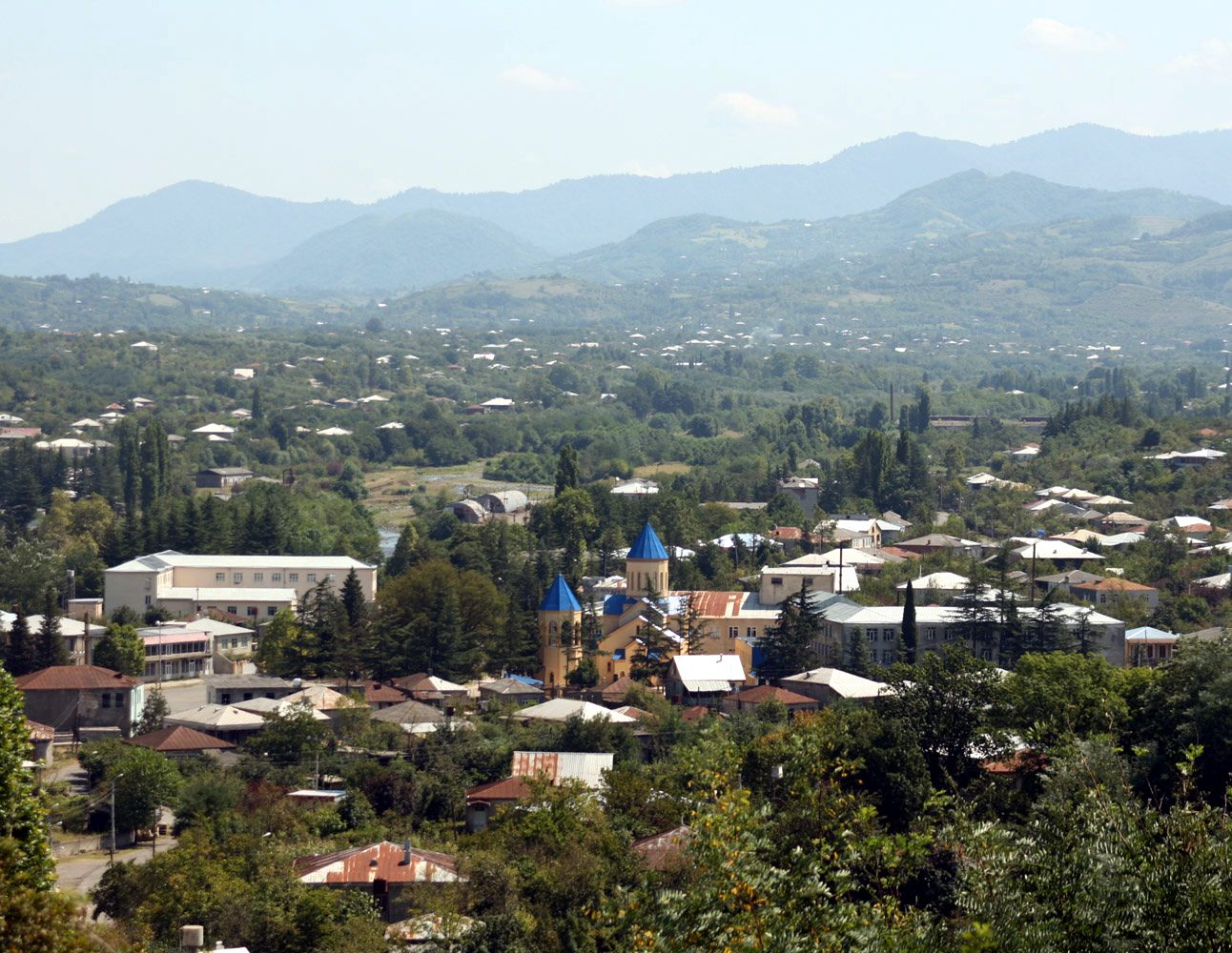 Вани. Вид на город Вани с холма археологического музея. Храм с синей крышей - центр города